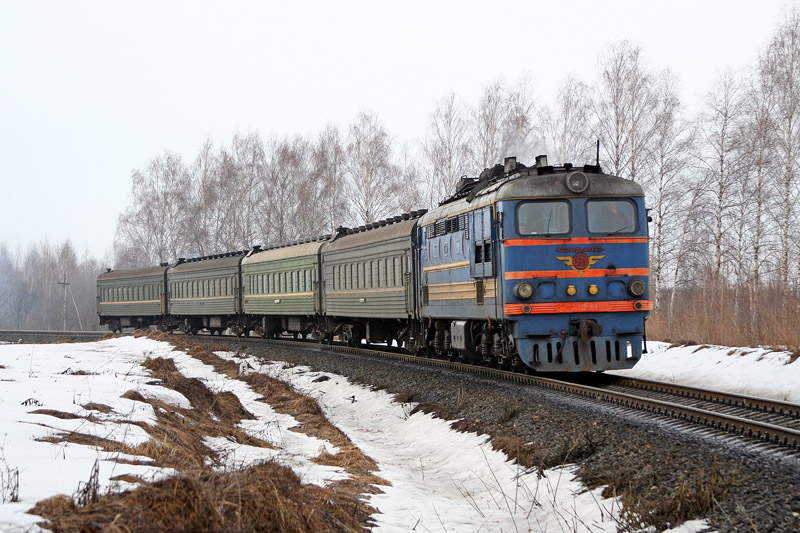 Тепловоз ТЭП10-314, перегон Муром - Стройдеталь, Горьковская ж.д.